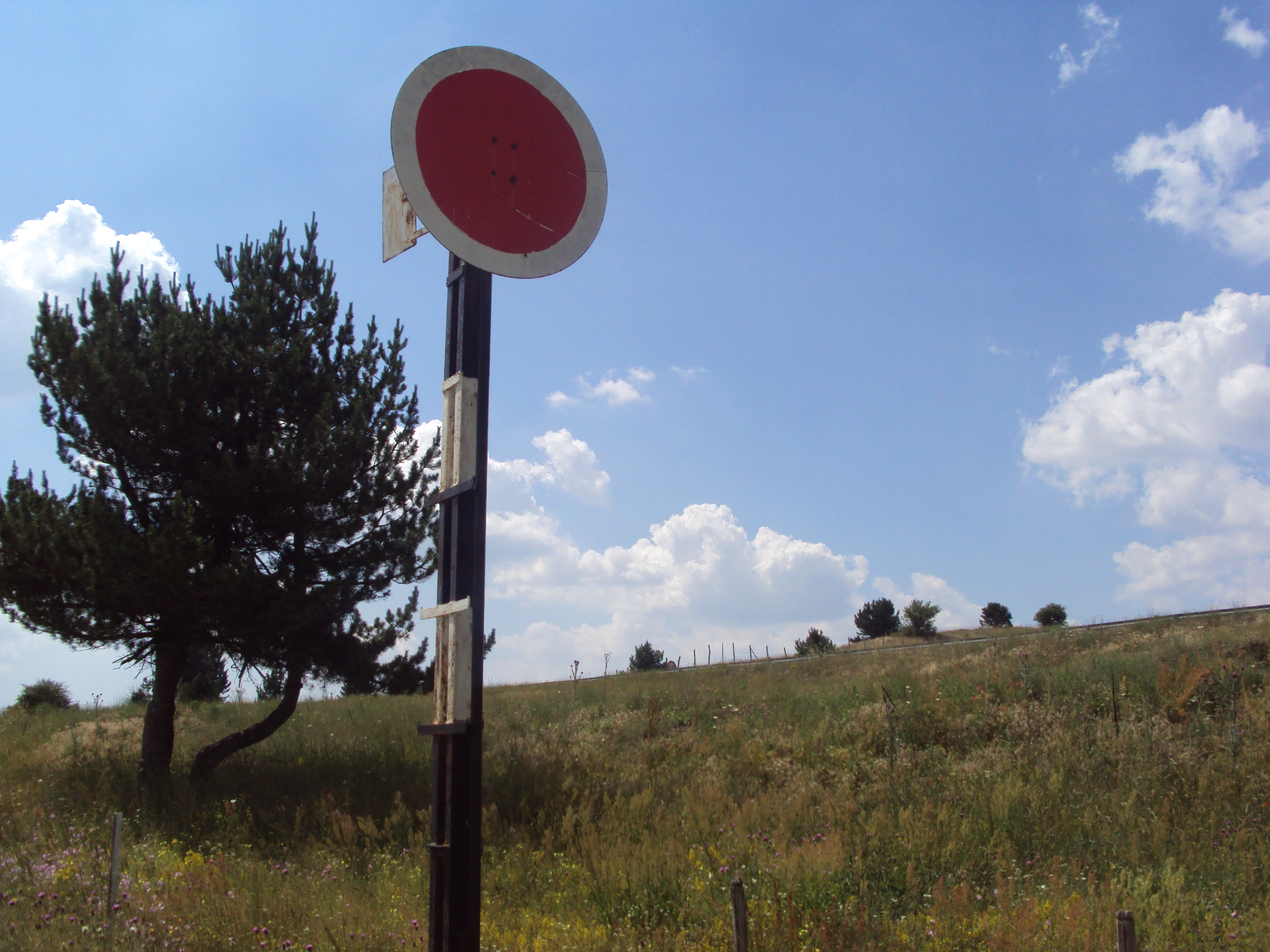 Segnale di protezione di tipo a disco non luminoso lato S.Giovanni in Fiore della stazione di San Nicola Silvana Mansio, sulla linea Cosenza - San Giovanni in Fiore delle Ferrovie della Calabria.